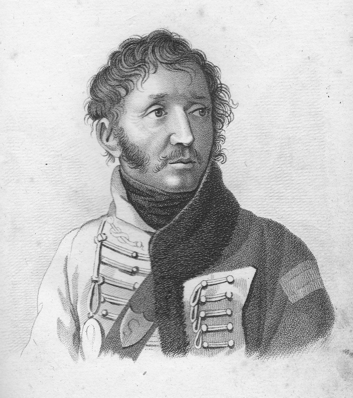 Jean-Baptiste Franceschi-Delonne (1767-1810), général de brigade de cavalerie du Premier Empire. Il se signala comme colonel du 8e hussards à Austerlitz et remporta plusieurs combats dans la péninsule Ibérique contre les Espagnols (Lerin, Mansilla). Capturé par la guérilla en 1809, il mourut en détention l'année suivante.